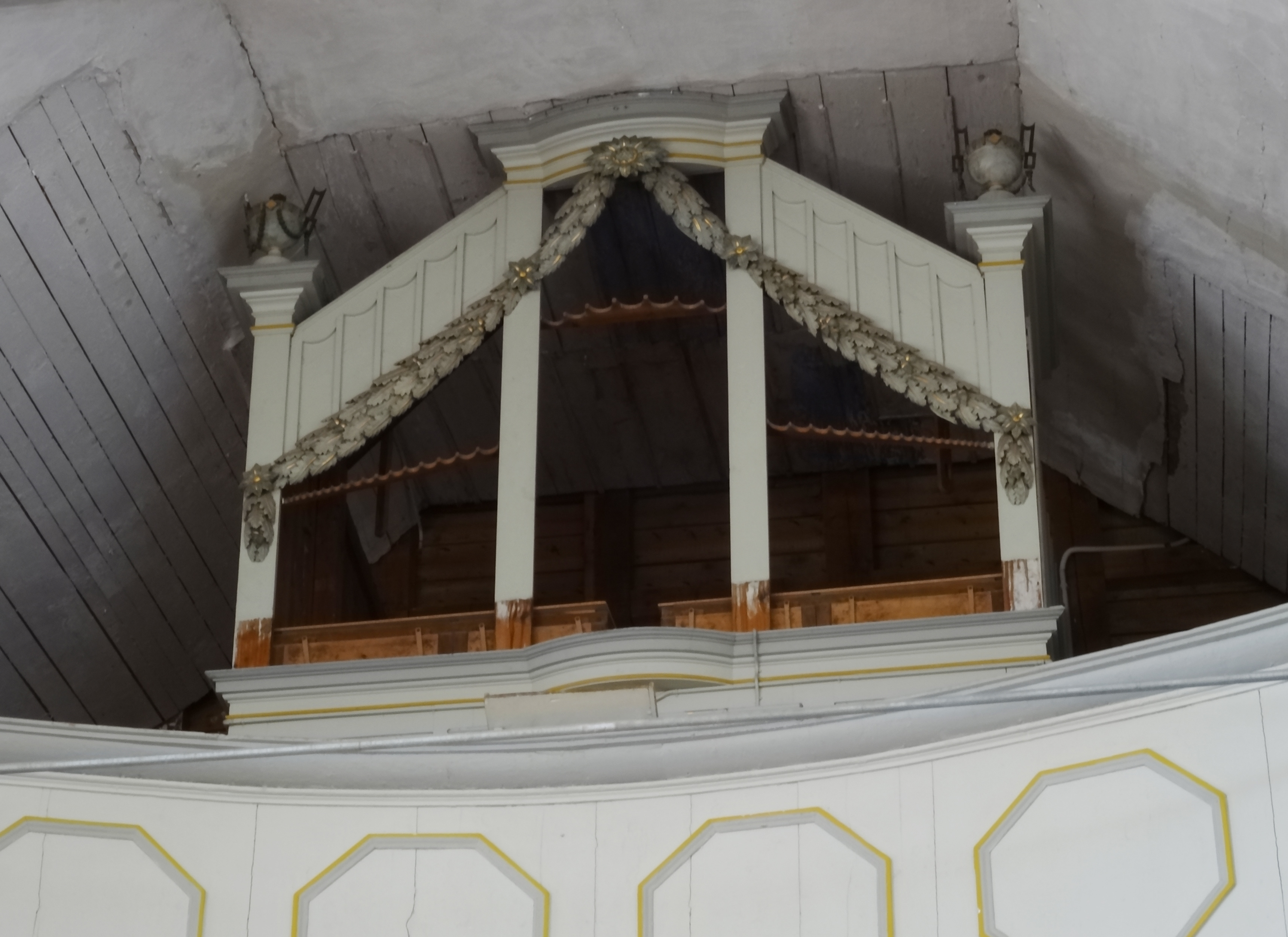 Die Orgel wurde 1823 vom Orgelbauer Johann Scheidler aus Bennungen geschaffen und befindet sich derzeit (2016) in Renovierung.